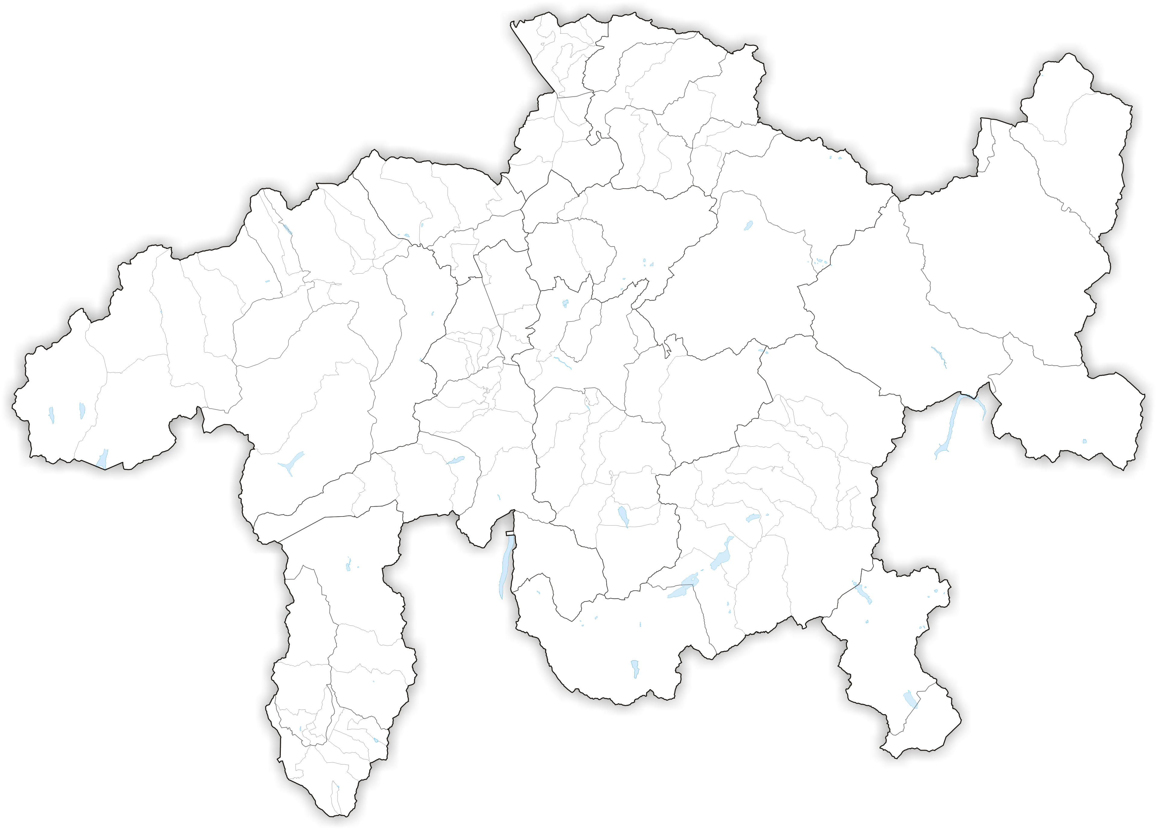 Municipalities in Canton Graubünden